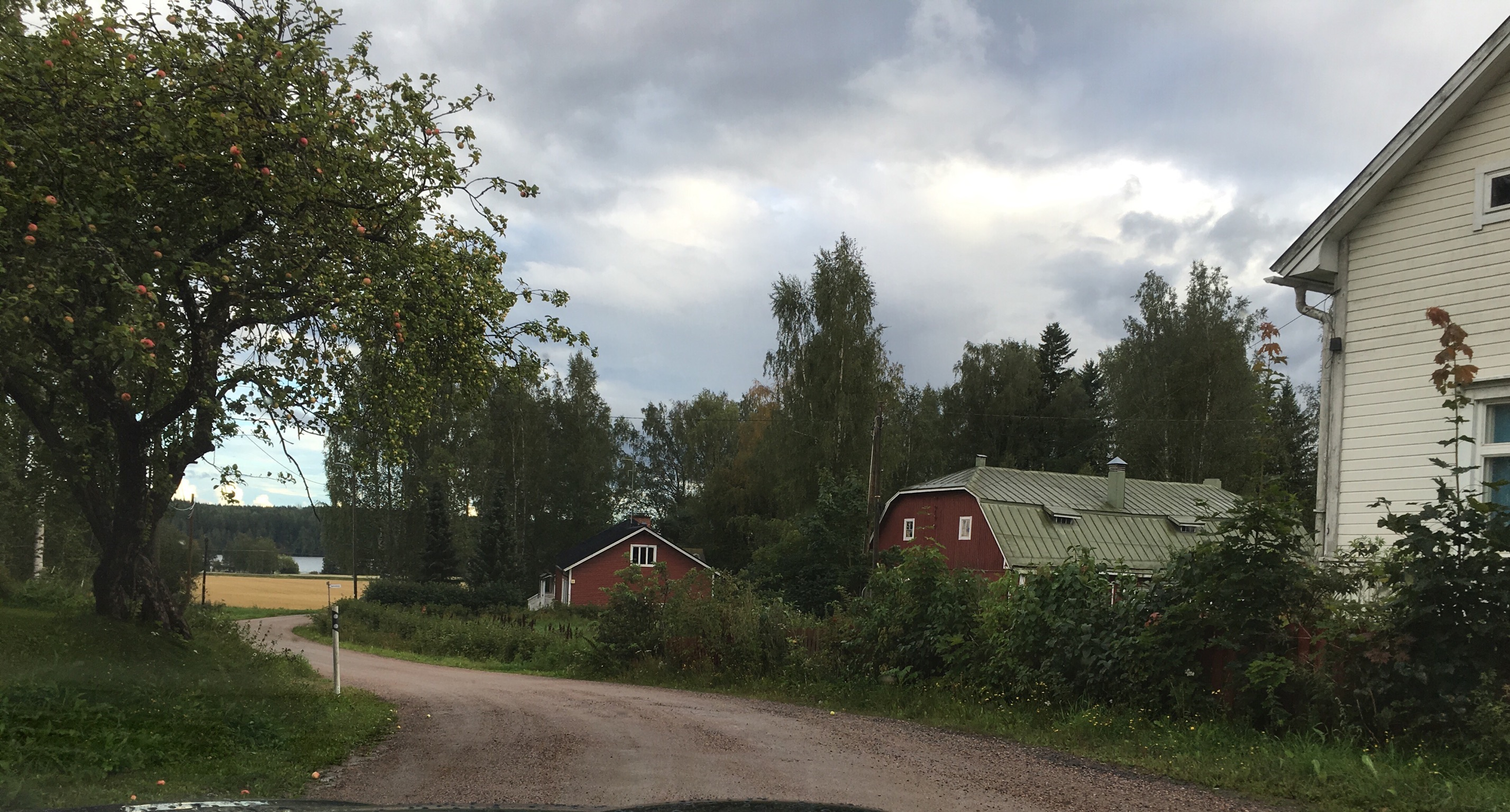 Levannon kylää Mäntsälässä